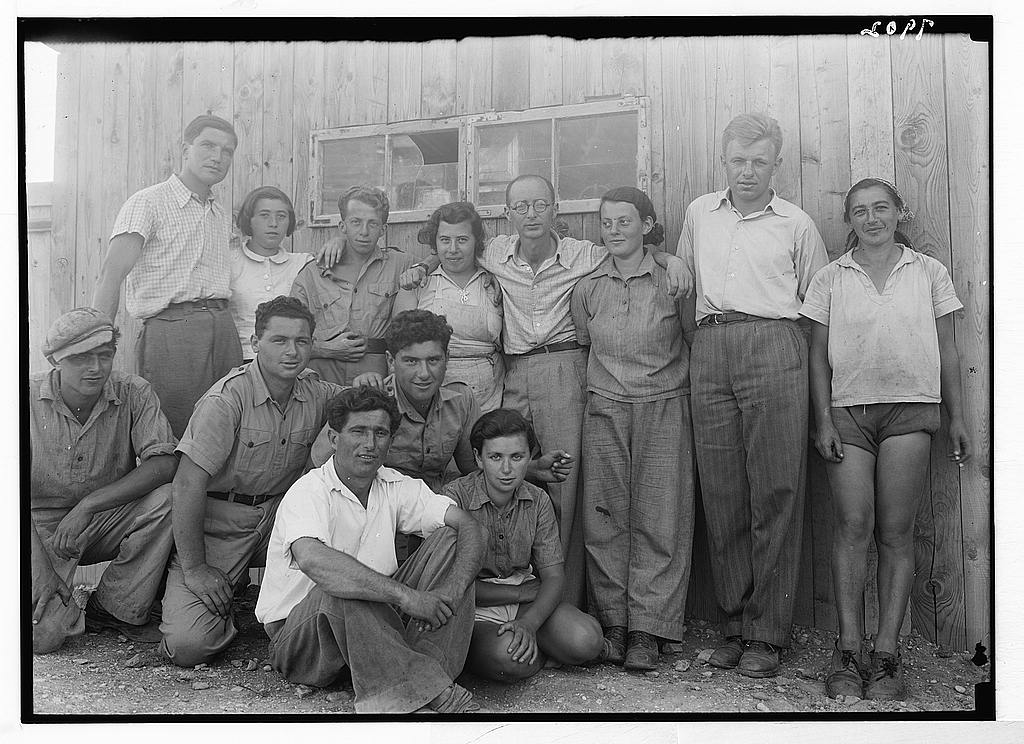 חלוצים בעין גב